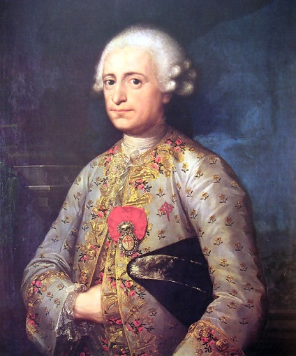 Retrato de José Joaquín Silva Bazán y Sarmiento, IX Marqués de Santa Cruz, VI Marqués de Arcicollar (1734-1802)